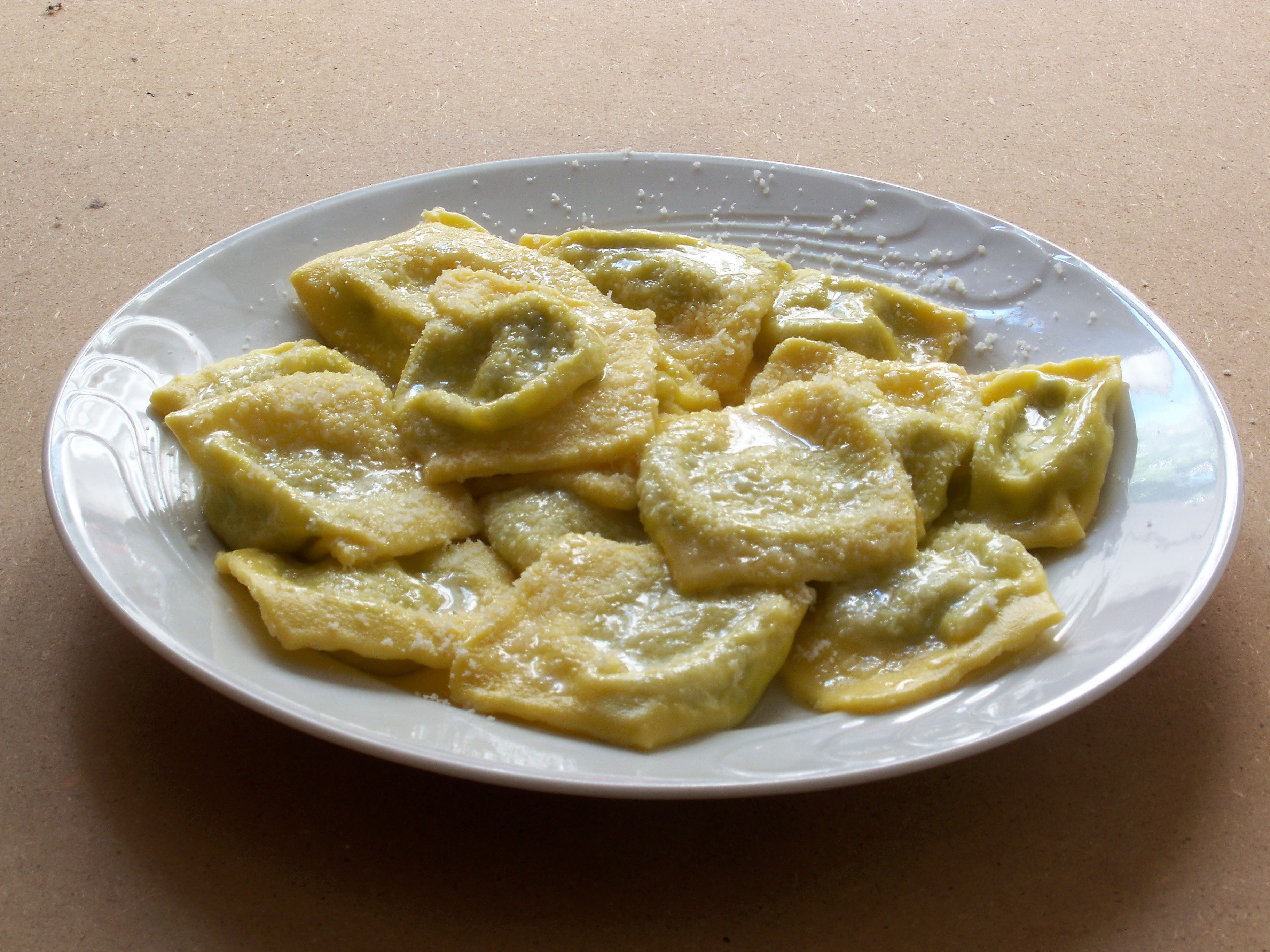 Un piatto di tortelli d'erbetta (tortelli d'erbe, tortelli d'erba, tortelli d'erbette) conditi con burro e parmigiano tortelli d'erbetta with butter and parmesan cheese